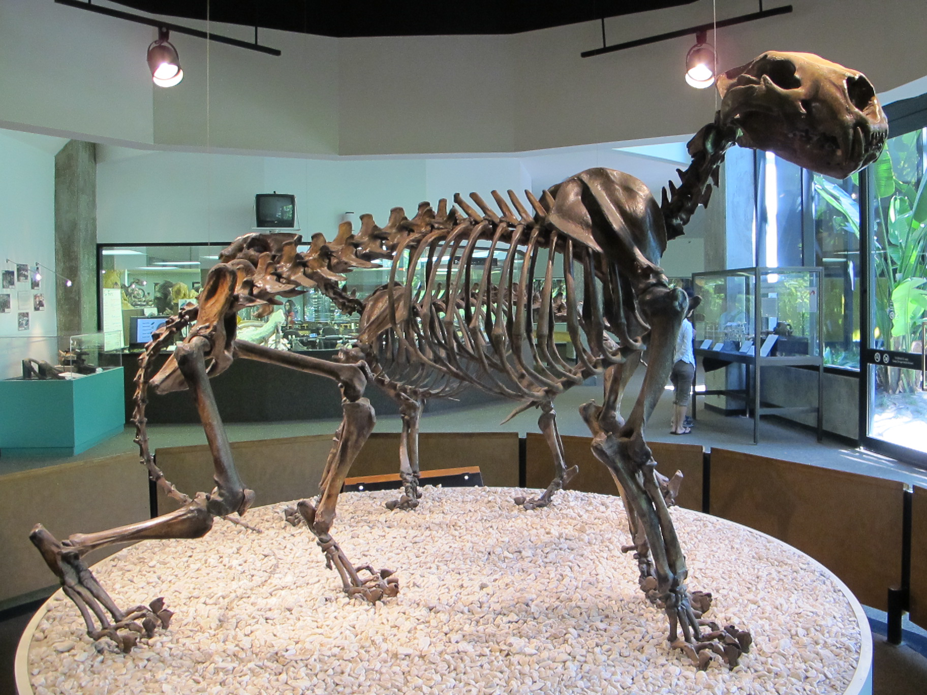 La Brea Tar Pits, Los Angeles